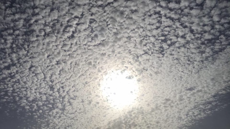 صورة جوية لتجمع السحاب في سماء محافظة المفرق في المملكة الأردنية الهاشمية